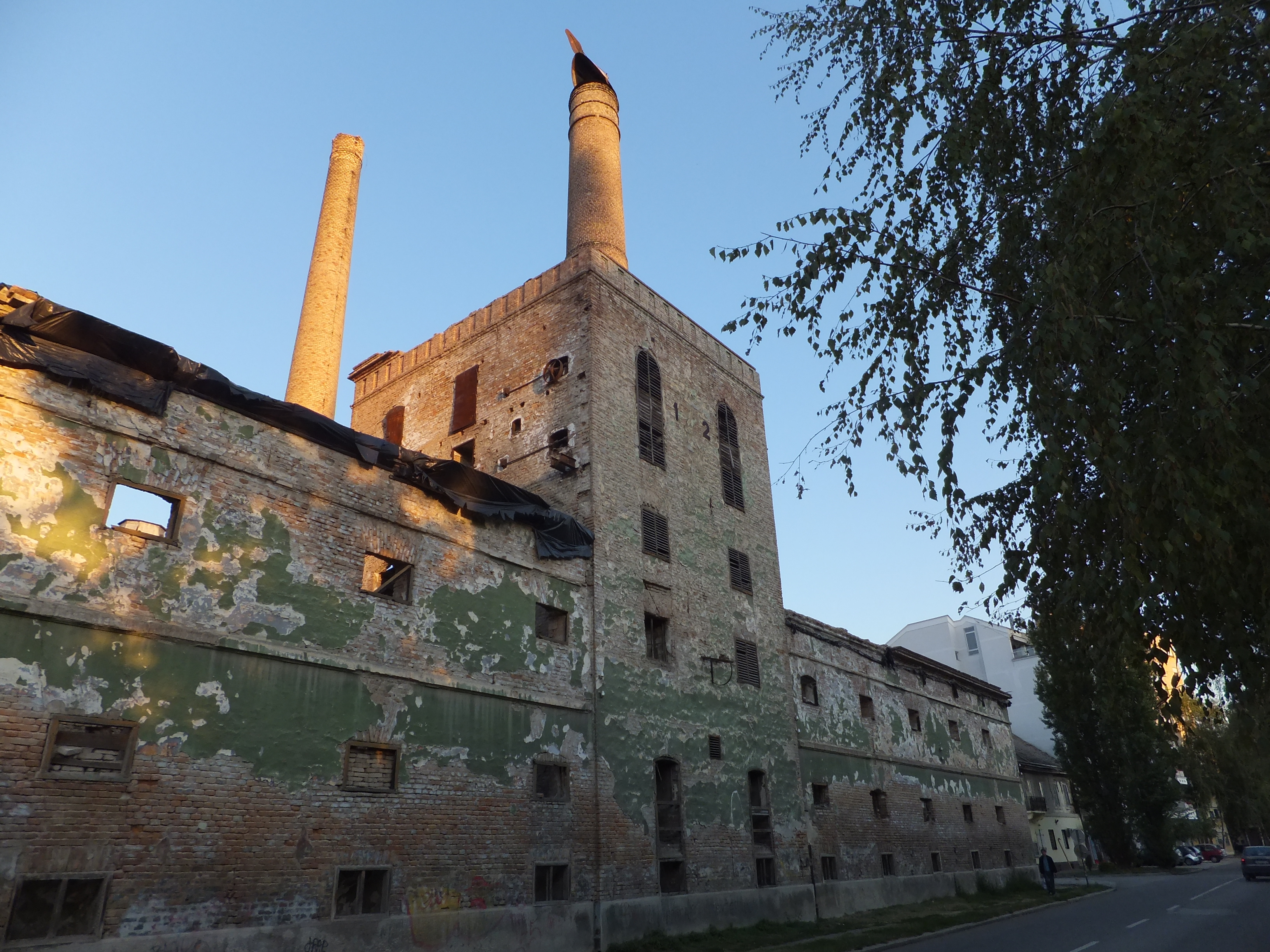 Зграда Народне пиваре у Панчеву